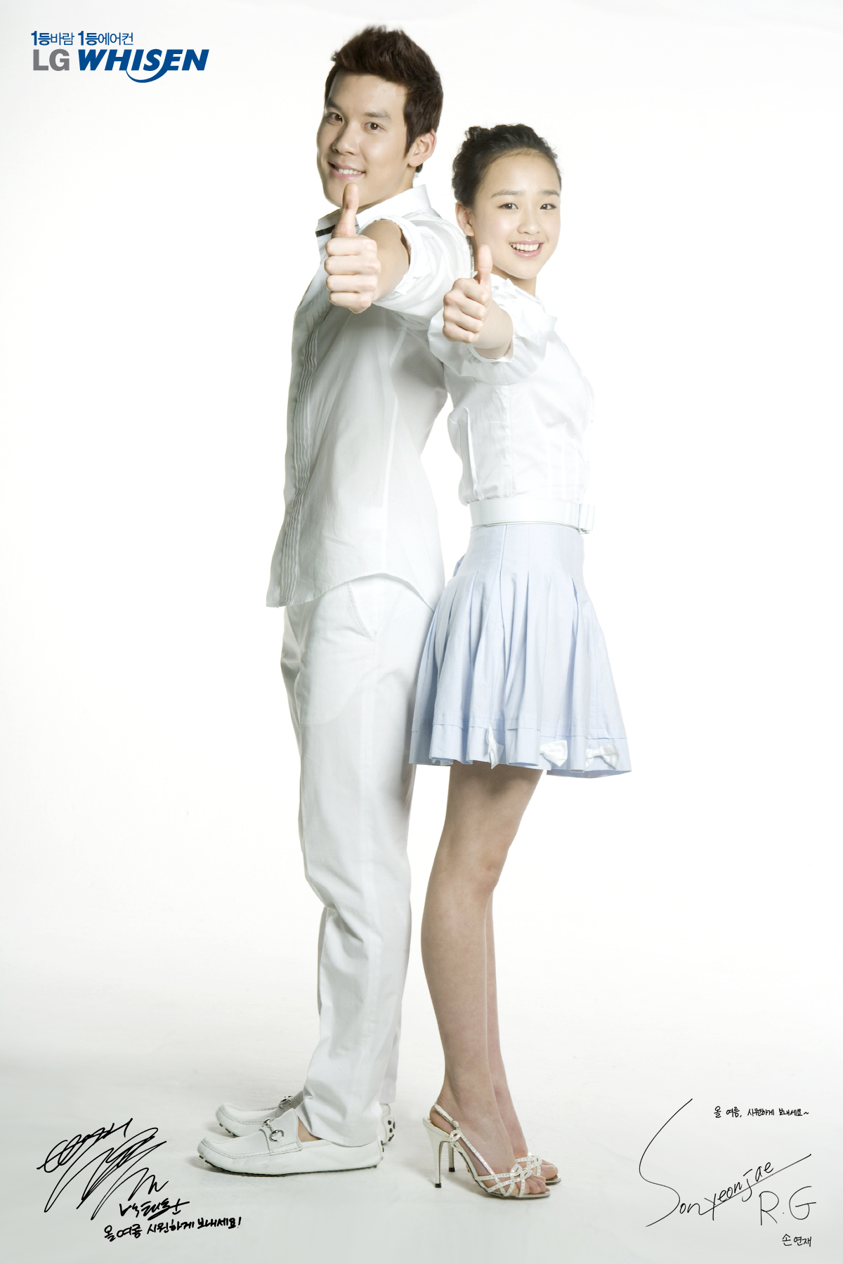 Lg whisen 손연재 지면 광고 촬영 사진 1등 바람 1등 에어컨!